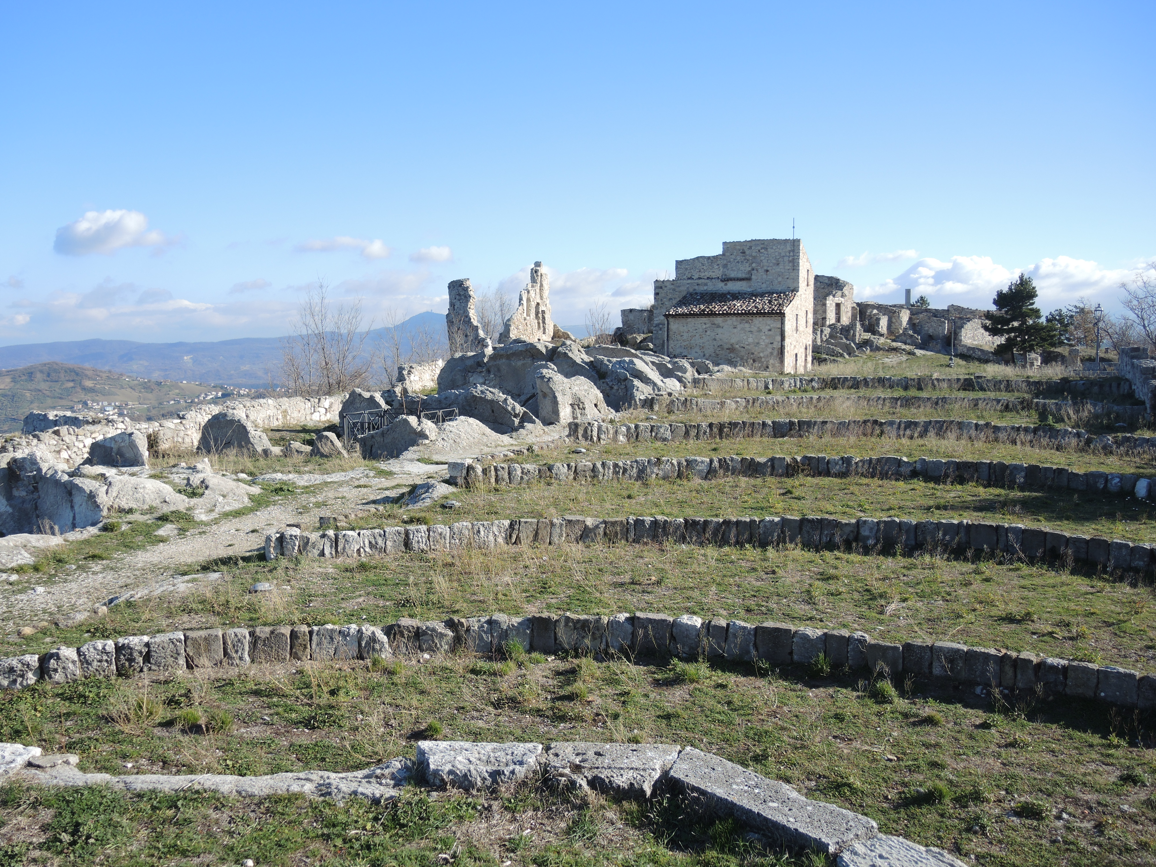 Gessopalena